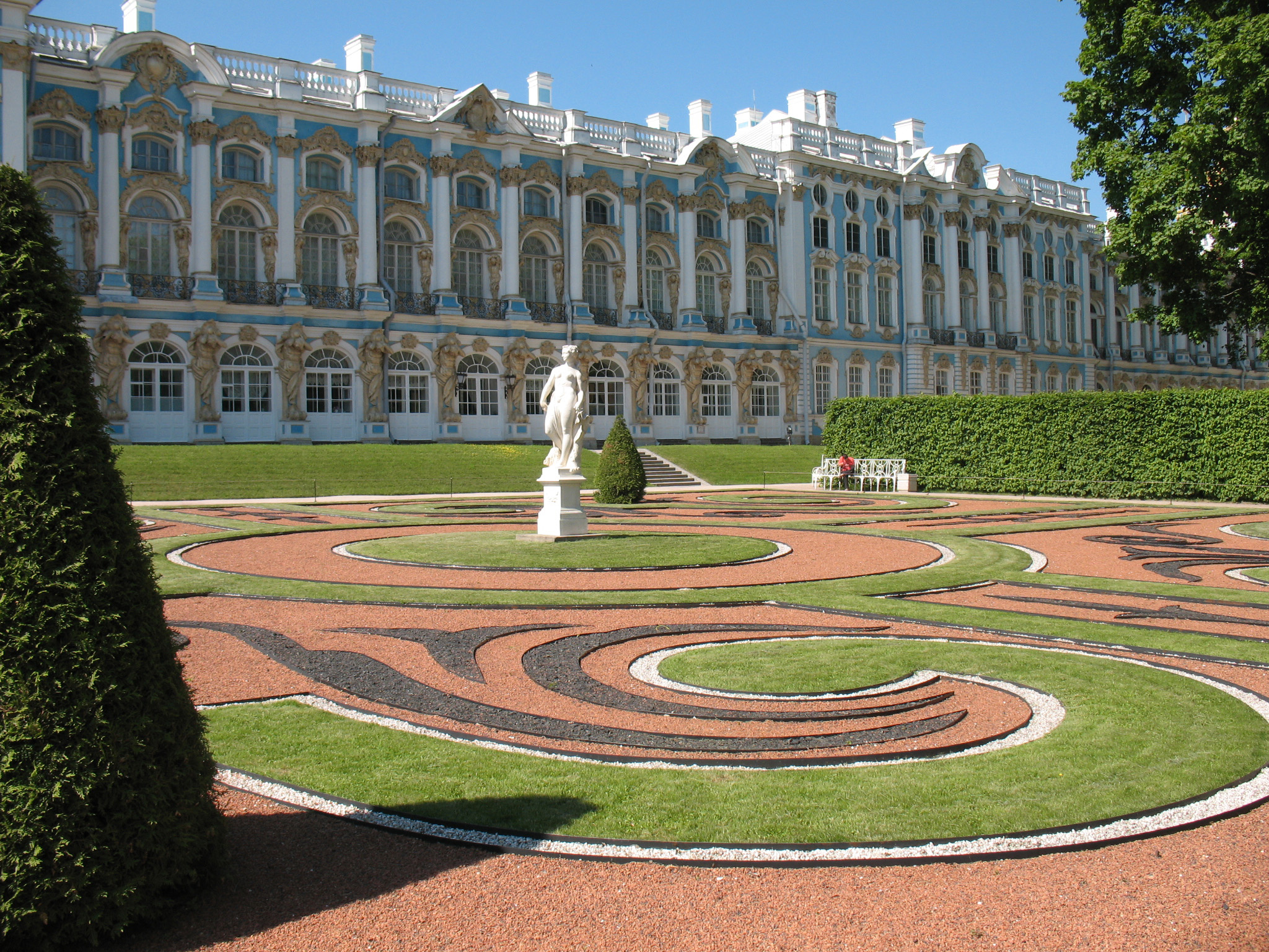 Санкт-Петербург, Екатерининский дворец. Фото сделано во время туристической поездки в Санкт-Петербург 08.06.2011г.